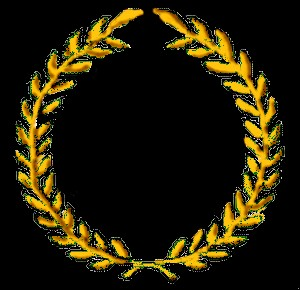 Golden laurel author Maciej Szczepańczyk user:Mathiasrex